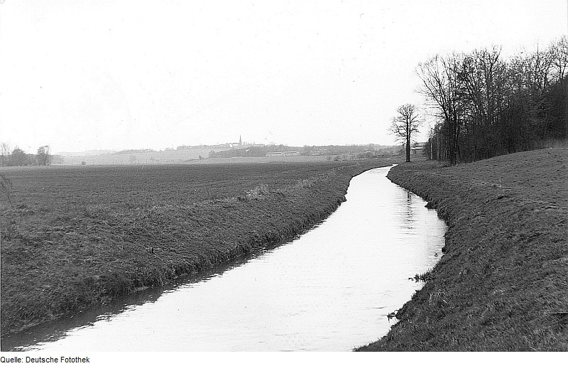 Original image description from the Deutsche Fotothek Neschwitz-Saritsch. Schwarzwasser mit Blick auf die Kirche von Storcha